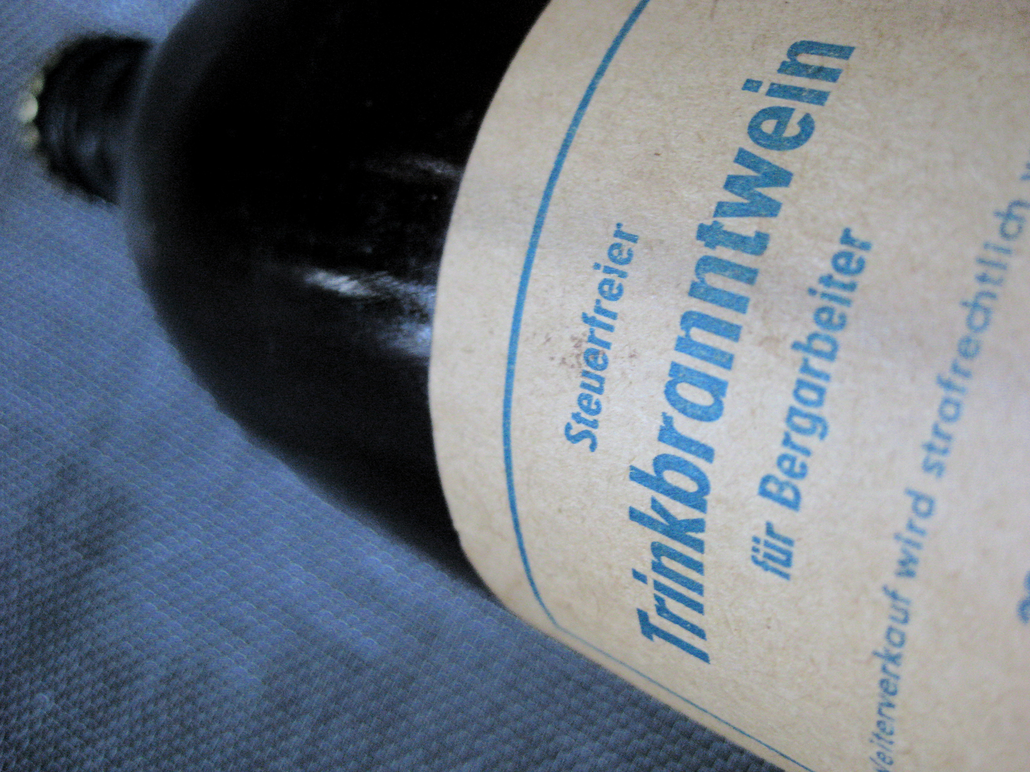 Steuerfreier Trinkbranntwein für Bergarbeiter- DDR - East Germany